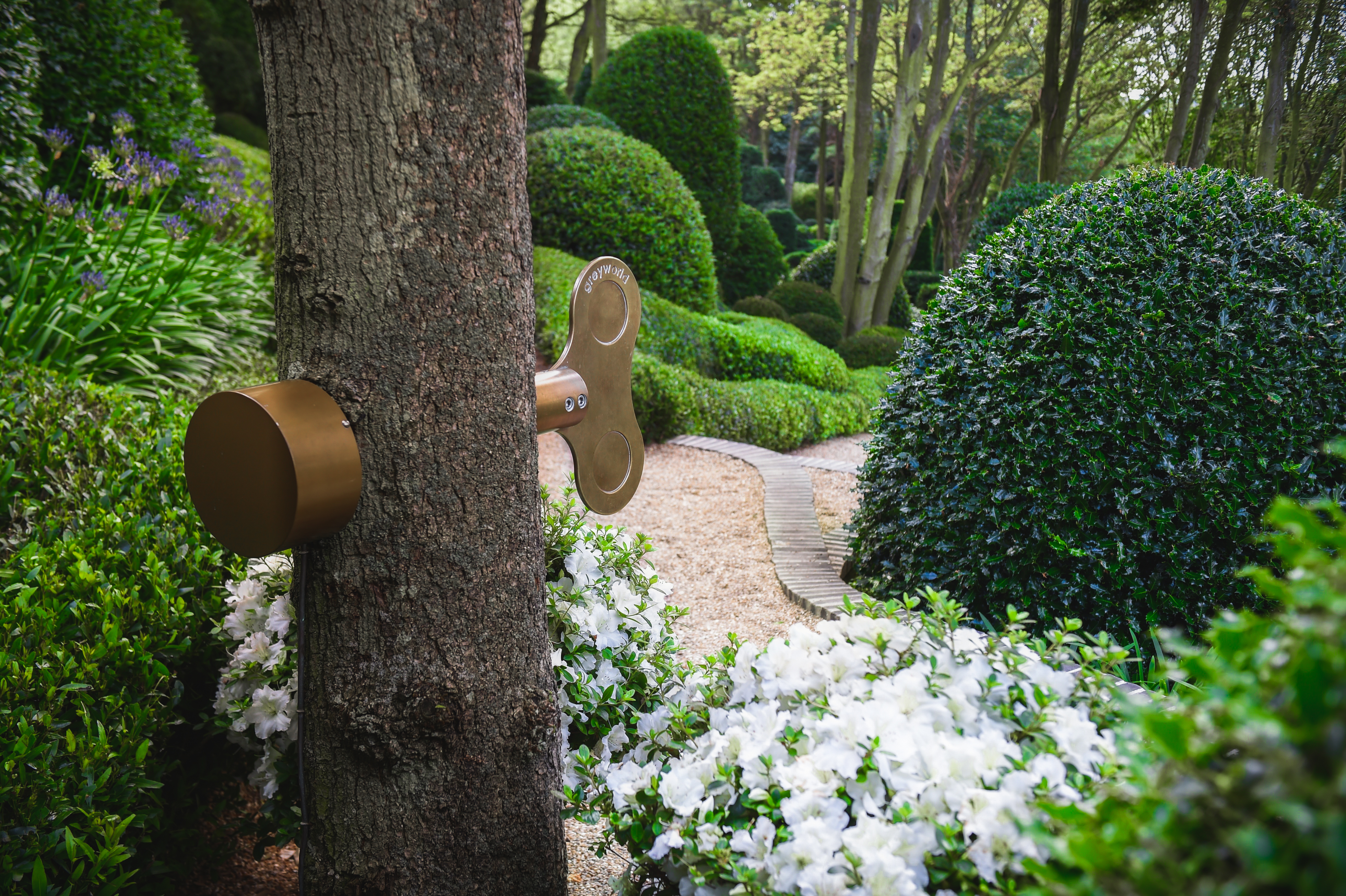 Clockwork Forest